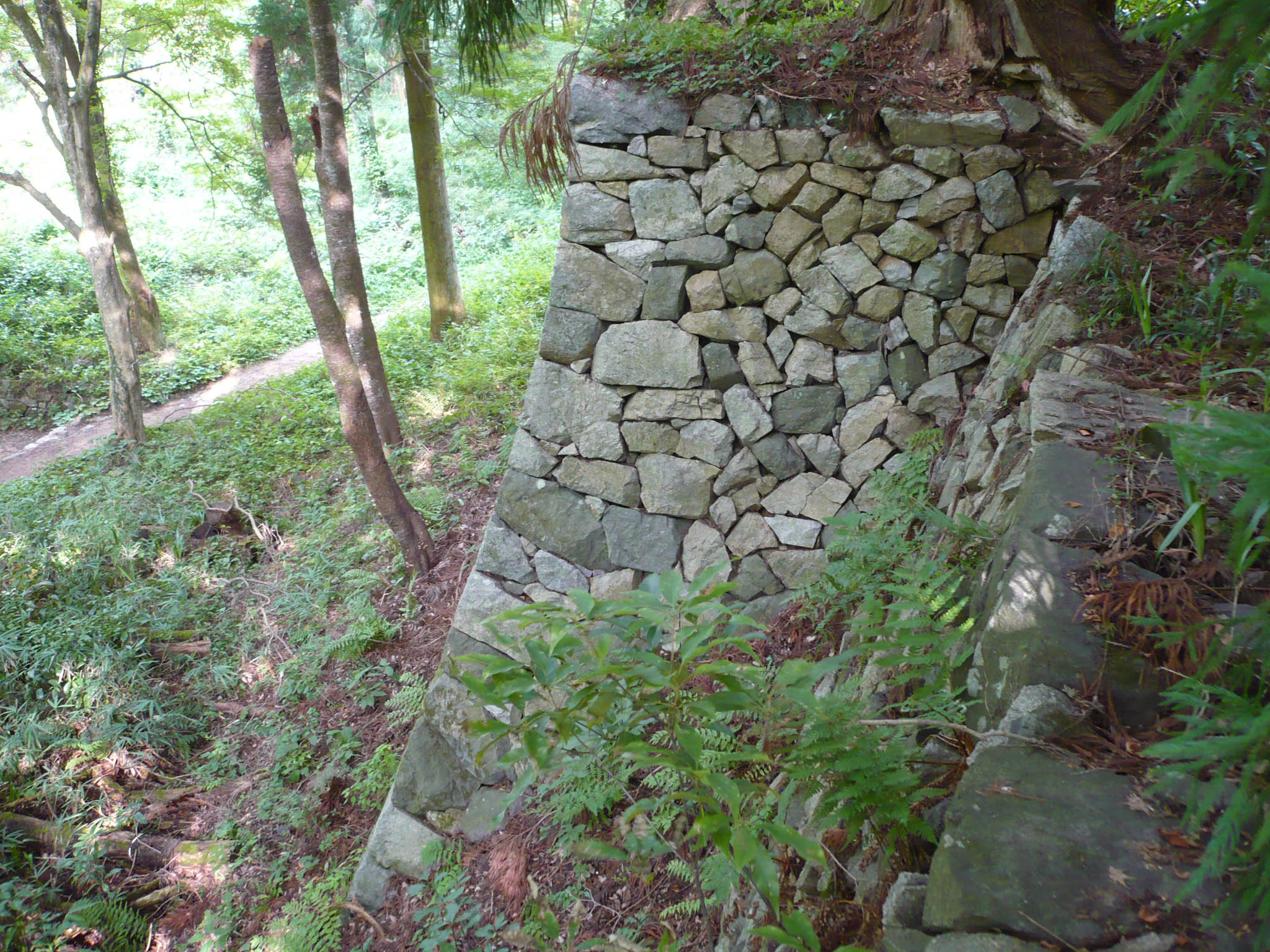 二の丸下の石垣